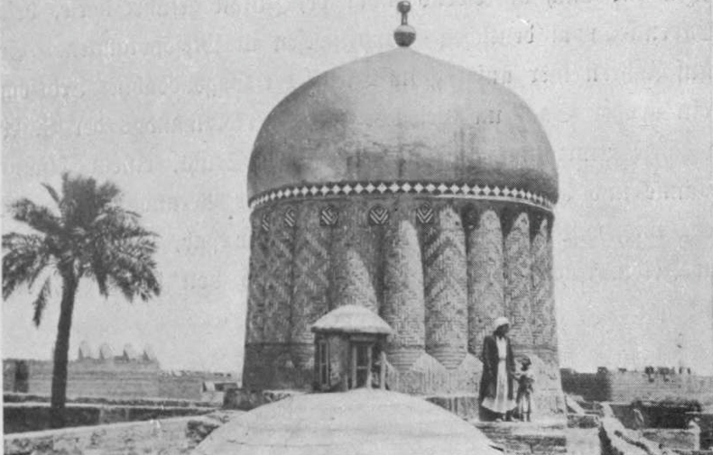 Baghdad, Iraq